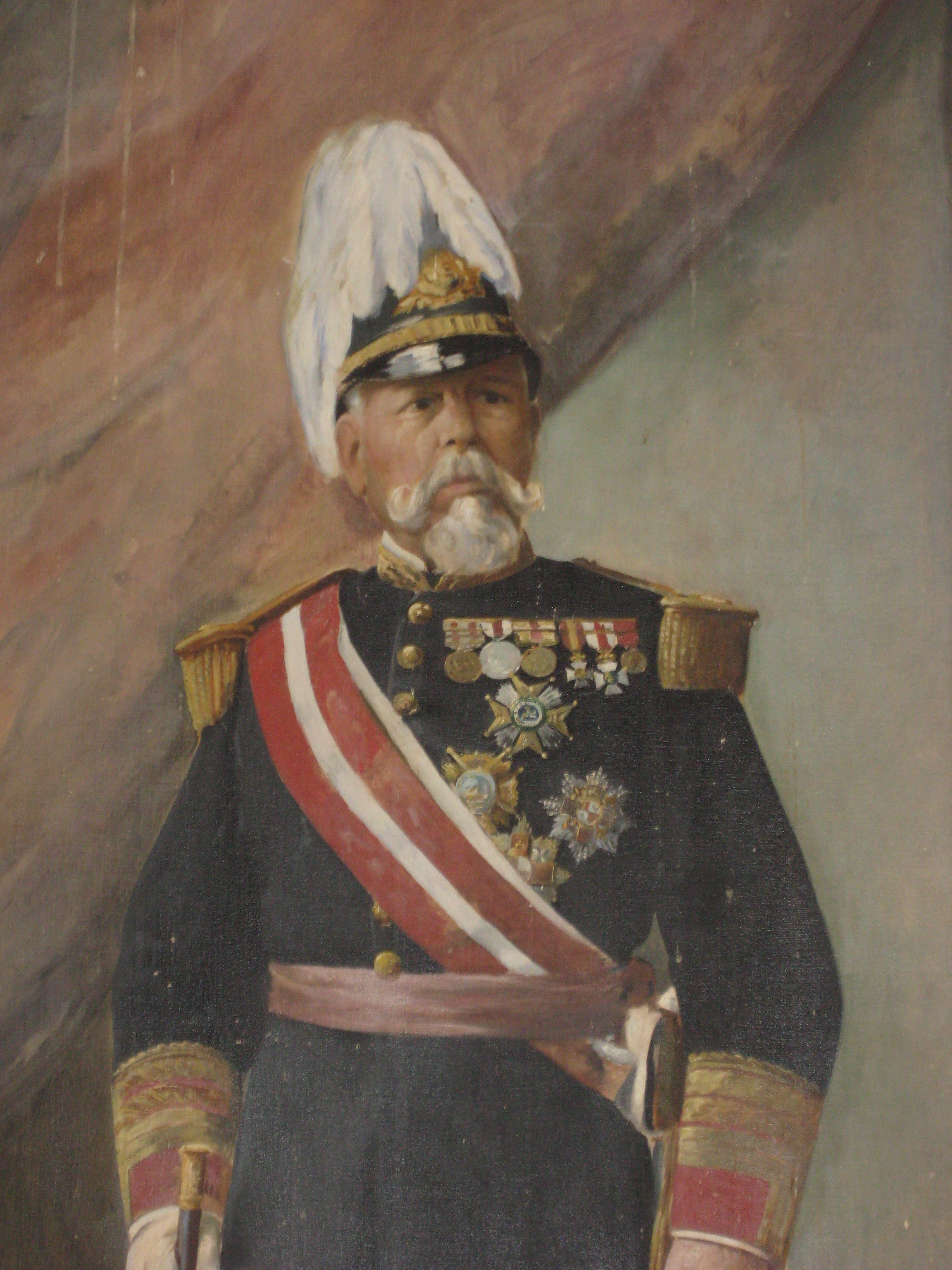 José Arrando Ballester, general valencià del segle XIX